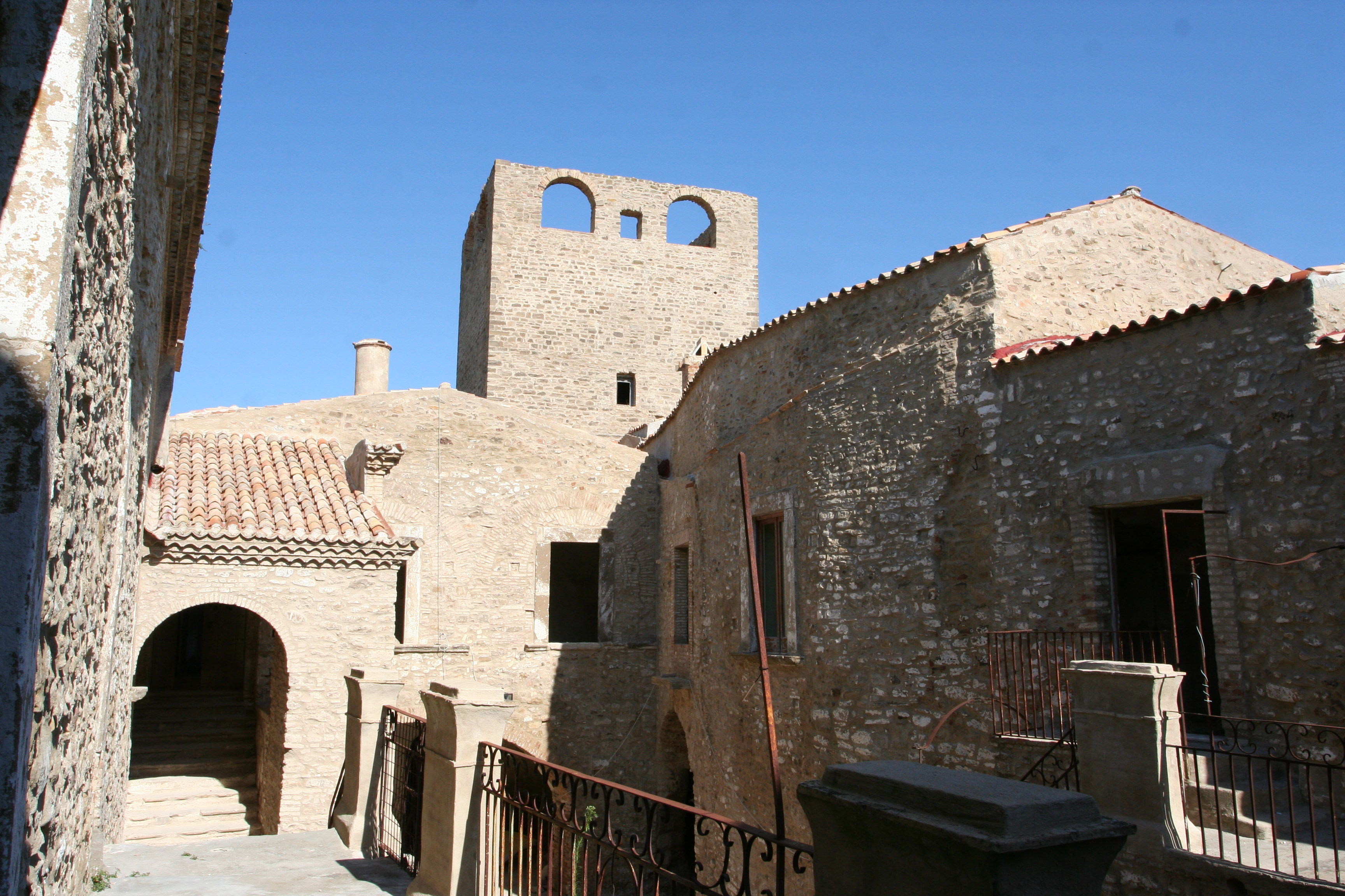 Edificato nel 851 dal principe longobardo Sichinolfo di Salerno, il castello presenta una torre centrale a base quadrata intorno alla quale si sviluppano i numerosi ambienti che danno vita all'intero complesso medievale. Al centro della torre c'è una finestra che affaccia verso il paese e che lega il castello al fantasma di Abufina ed alla leggenda dell'amor perduto.